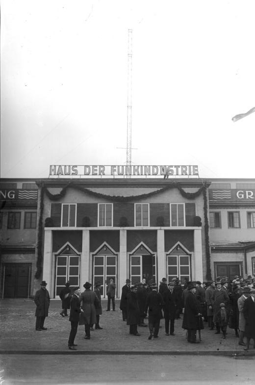 Eröffnung der großen Funk-Ausstellung am Kaiserdam. Blick auf den Haupteingang der Funk-Ausstellung am Eröffnungstage.